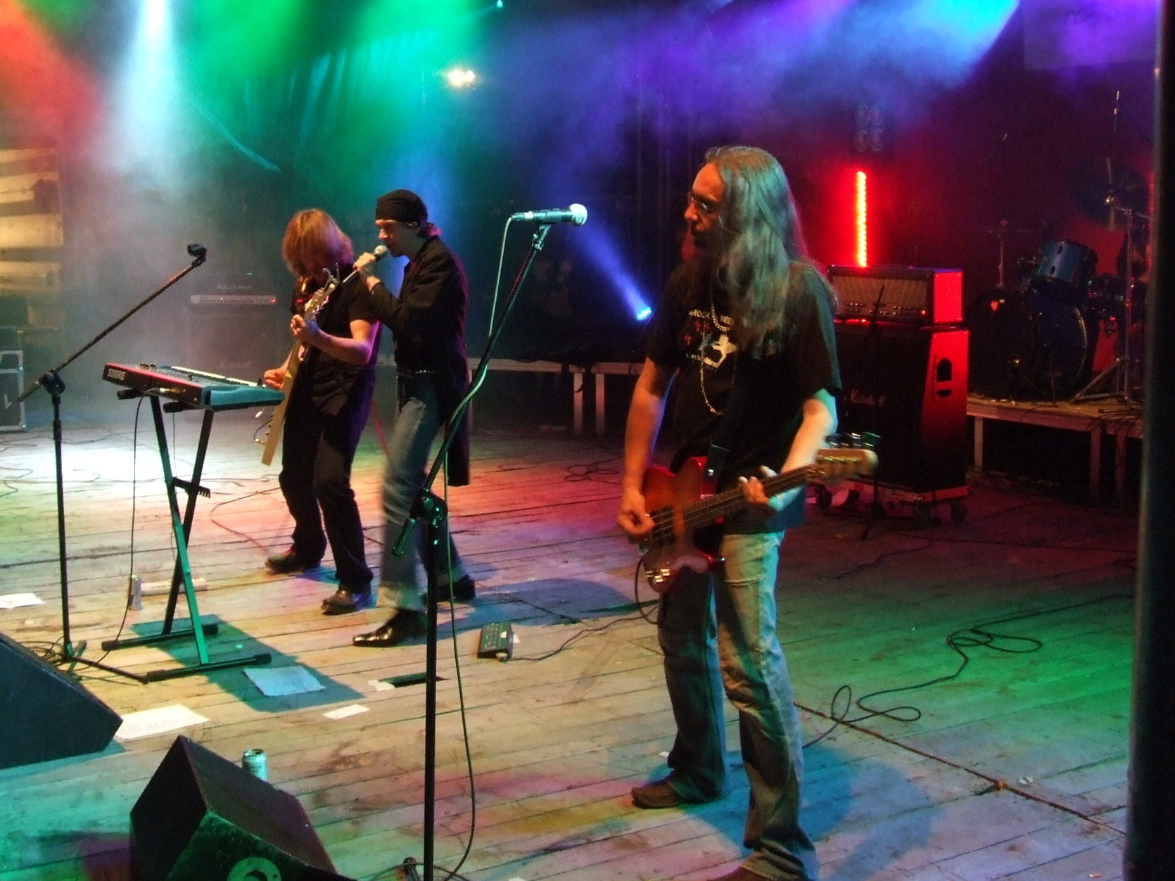 Гурт N.R.M. як Мроя - адмысловы канцэрт з нагоду ХХ фэстывалю Басовішча